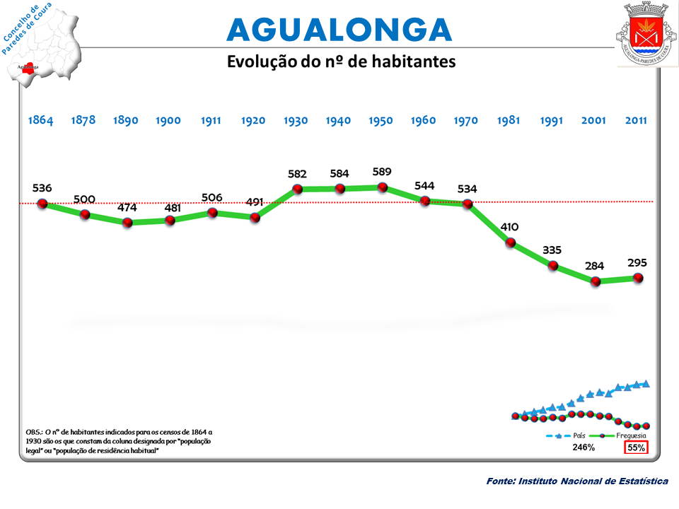 Censos 1864/2011